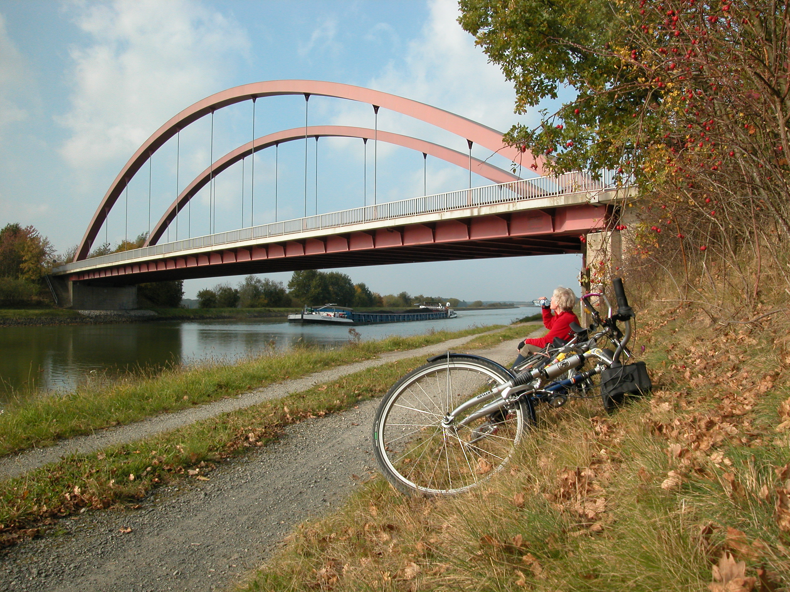 Am Elbe-Seitenkanal bei Altenmedingen Standort:53°8′20.3″N 10°33′58.43″E / 53.138972°N 10.5662306°E